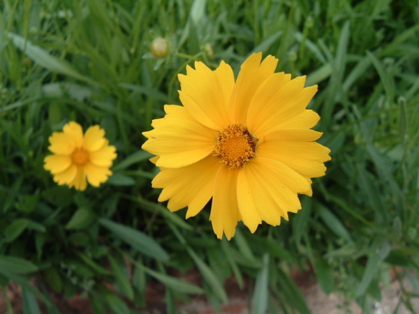 El Denis Conrado, en Universidade Federal de Lavras, Brazilo.